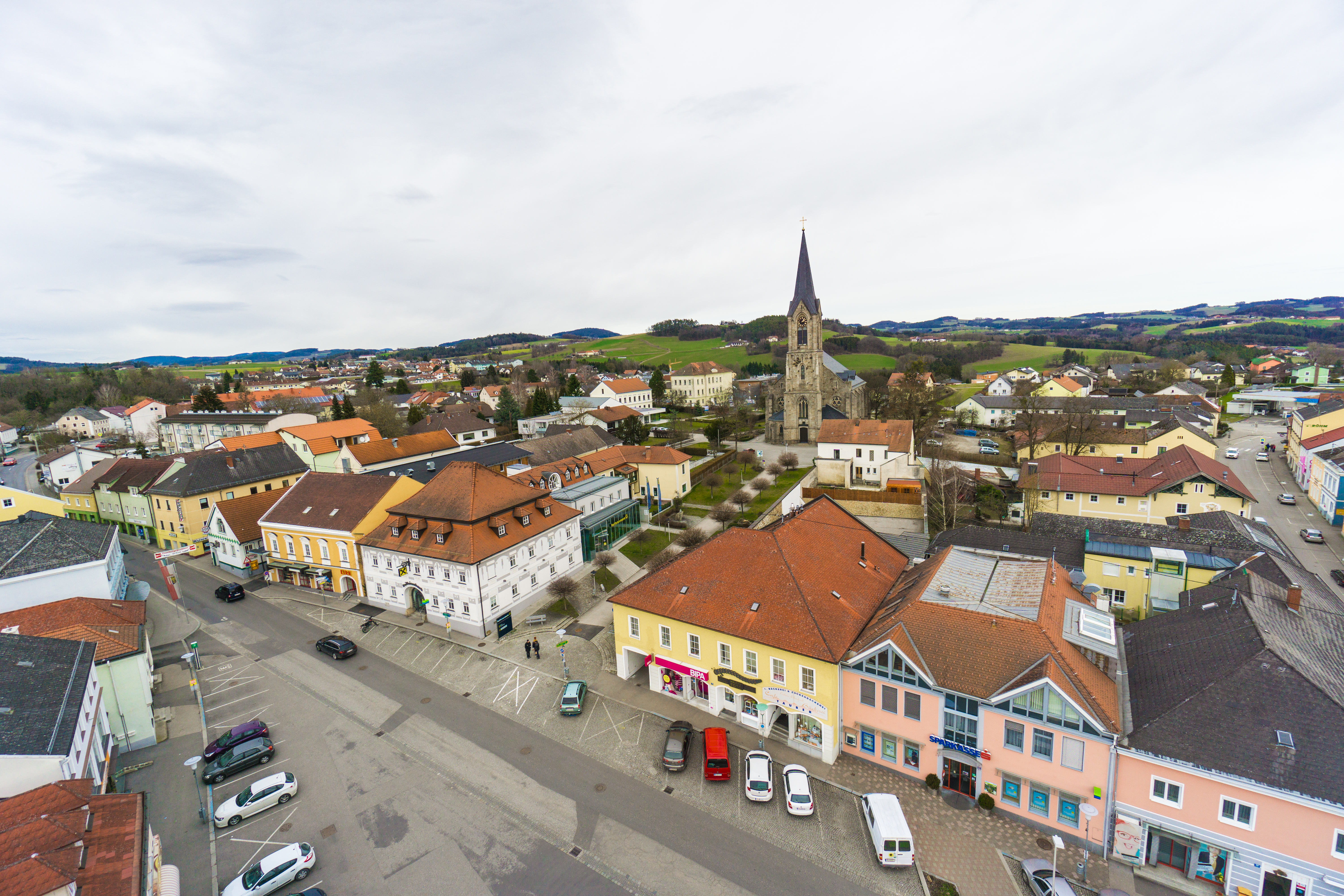 Stadtplatz, Stadtpfarrkirche und Kirchenplatz, Gutauerstraße und Tragweinerstraße.